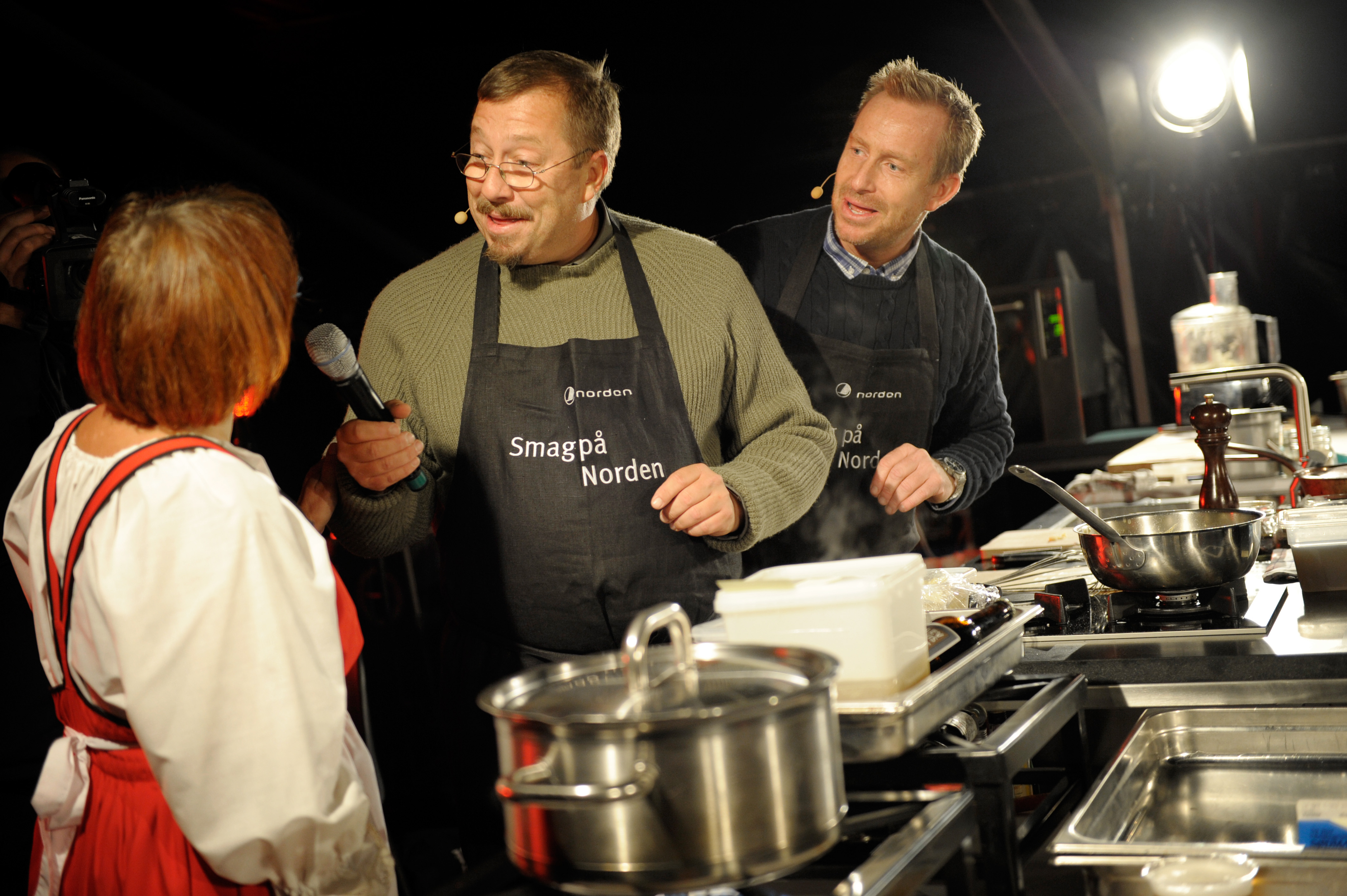 Brødrene Price lagar mat på Kulturnatten 2010.